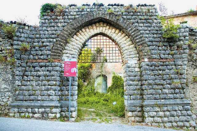 L'ingresso di Palazzo Cenci Bolognetti - Del Balzo, San Martino Valle Caudina (AV), Italia